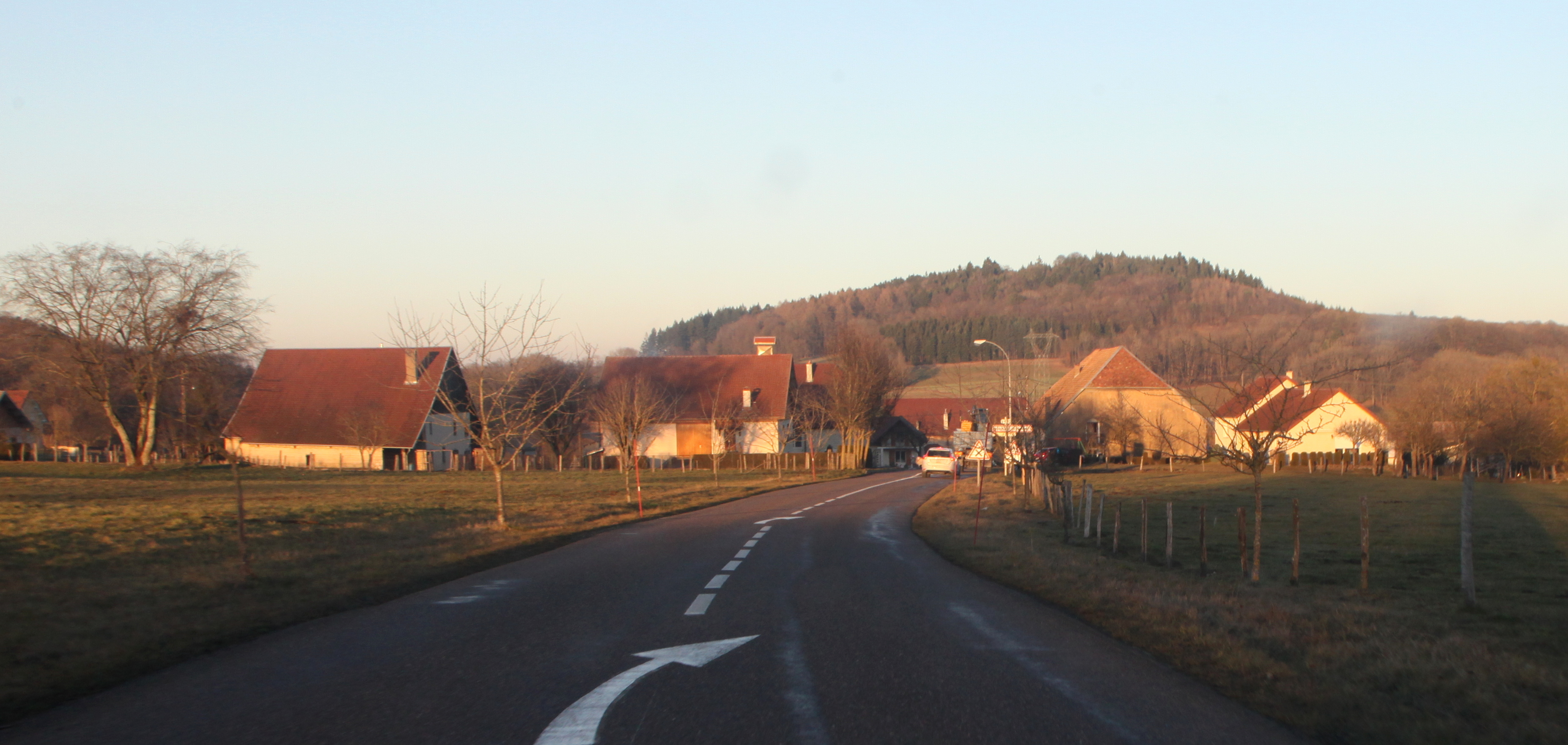 Vue d'Adam-lès-Passavant (Doubs).